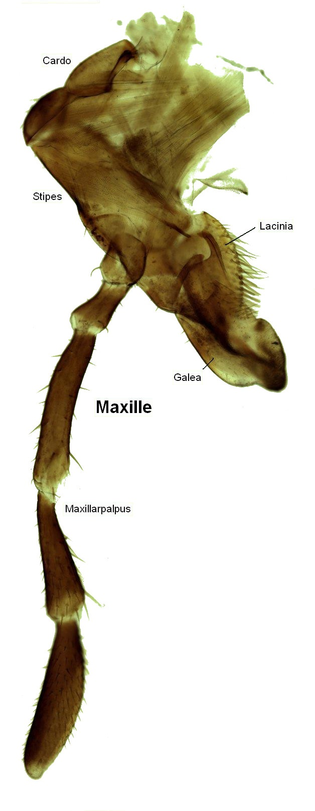 Maxille von Periplaneta americana, beschriftet